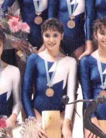 Marisa Centeno con el conjunto español en el Mundial de Varna en 1987.